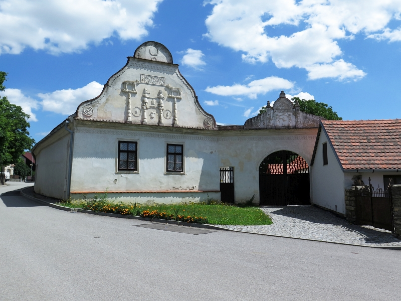 Bývalá hospoda, Miloňovice 4, Miloňovice.